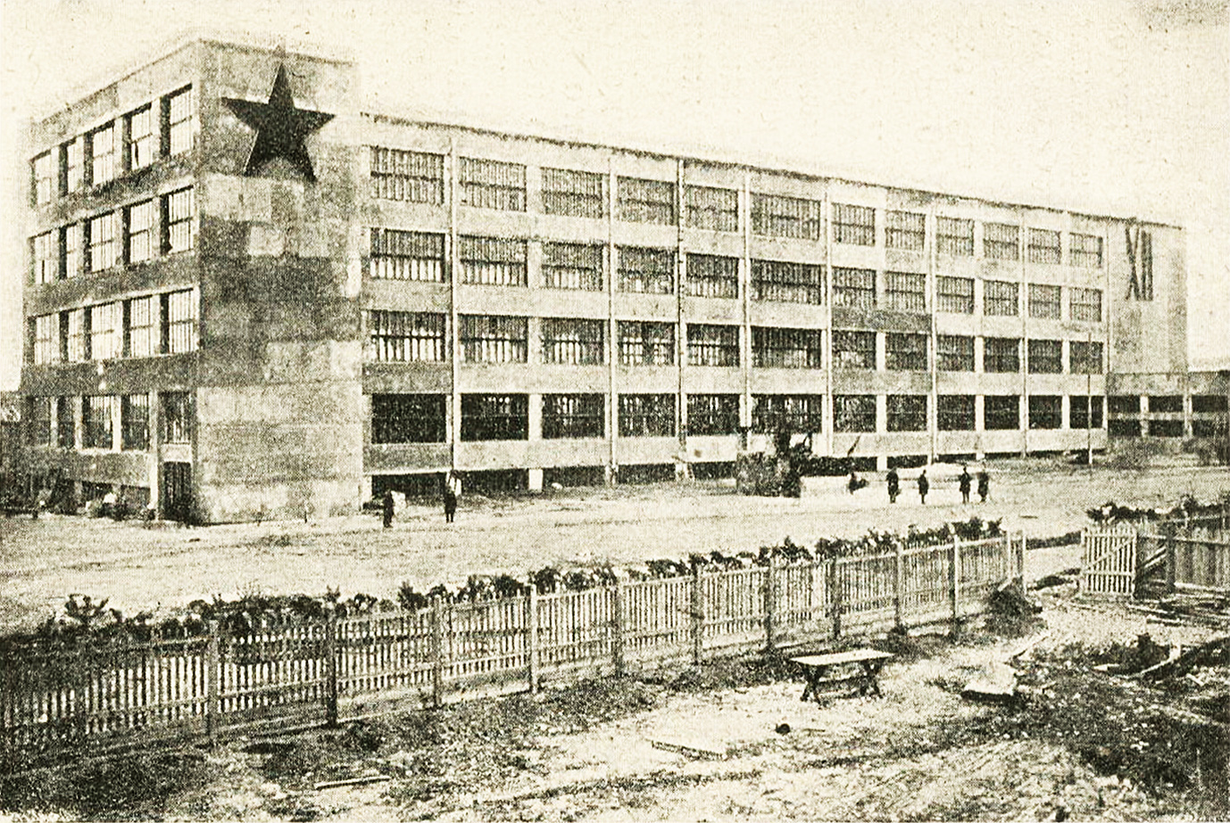 IV взуттярня на Куренівці (проспект Степана Бандери, 7)